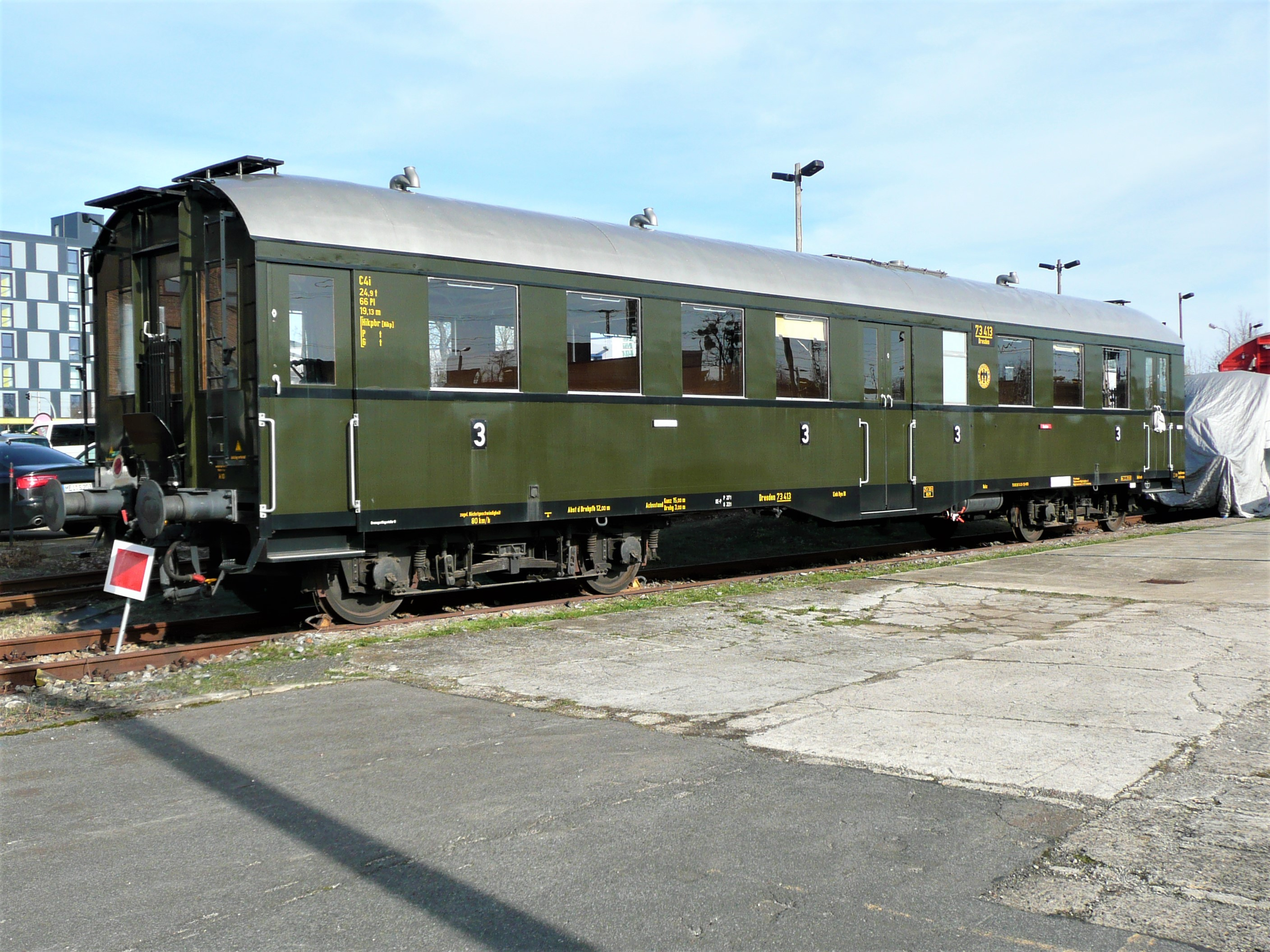 erhaltener Personenwagen aus dem Jahr 1938 der Bahnlinie Heidenau-Altenberg